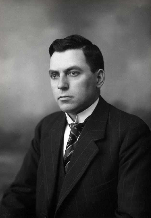 J. Tjalma (ARP), Burgemeester van Hoogeveen. Nederland, ca. 1935.